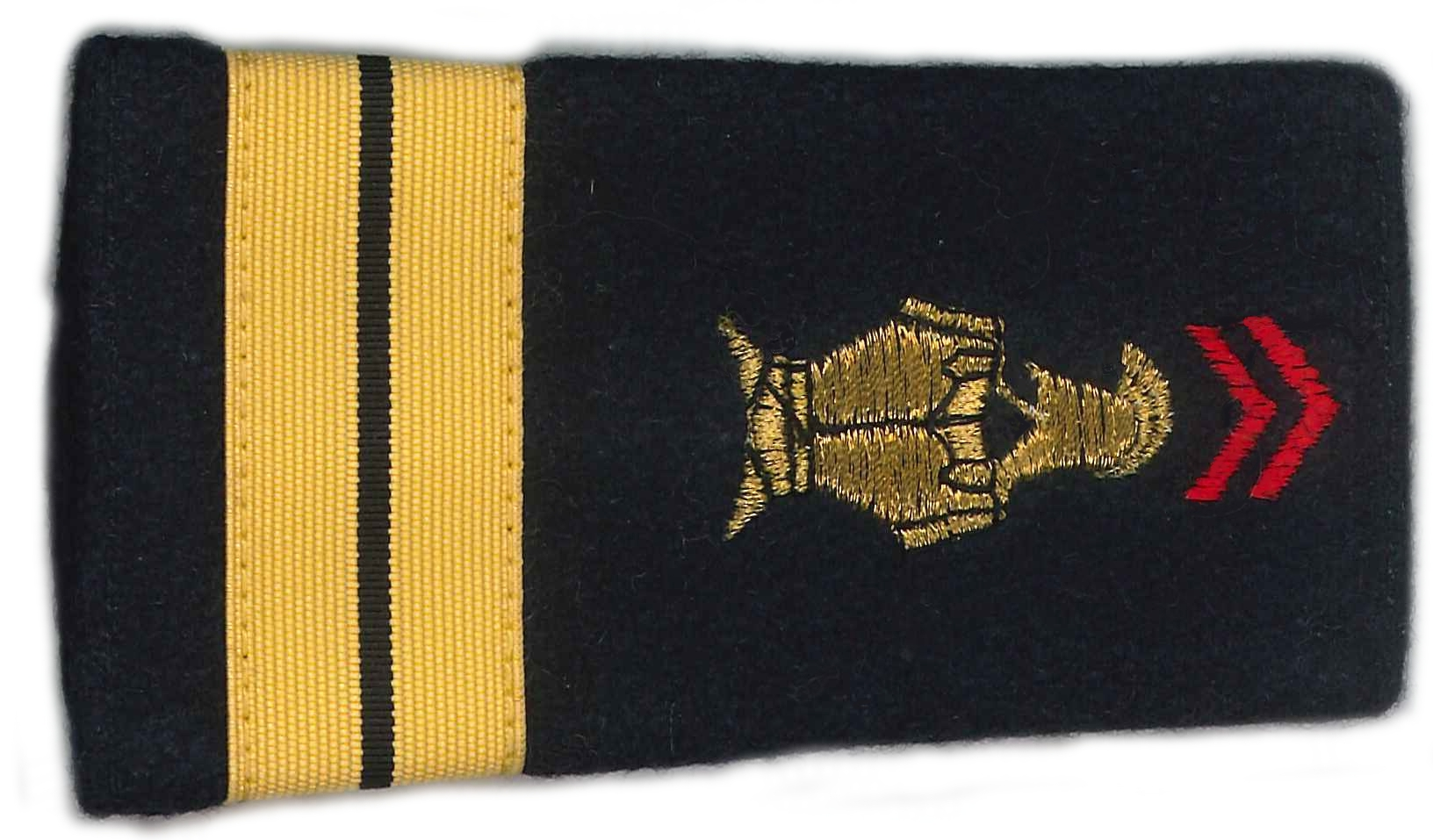 Fourreau d'épaule de lieutenant sapeur pompier de Paris